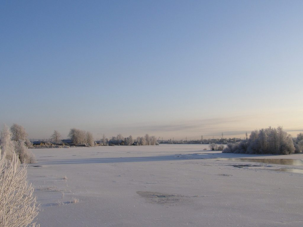 Река Шуя зимой